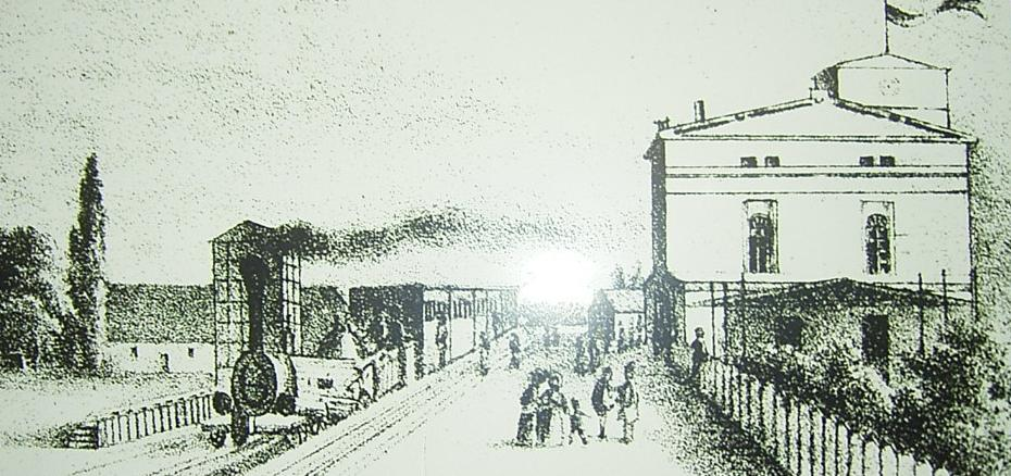 Der Bahnhof in Fürstenwalde/Spree, 1842 erbaut, in einer Lithographie etwa von 1845.